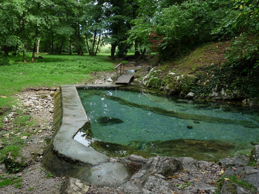 Toplice Klevevž